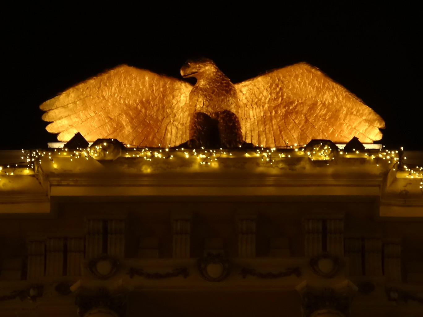 Hotel Pod Orłem w Bydgoszczy przy ul. Gdańskiej 14 (zbud. 1896, Józef Święcicki)